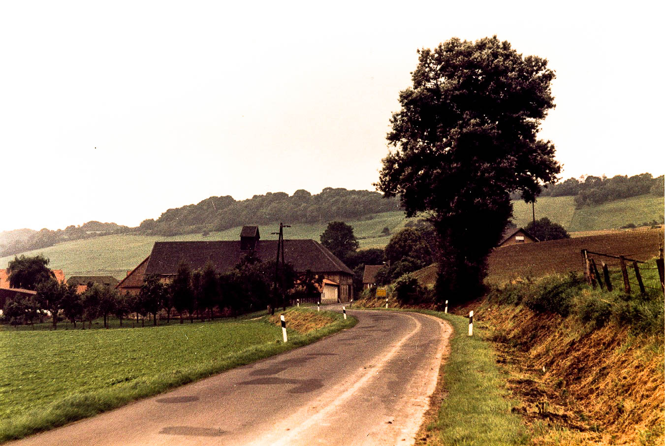 Bruchhof (1984)